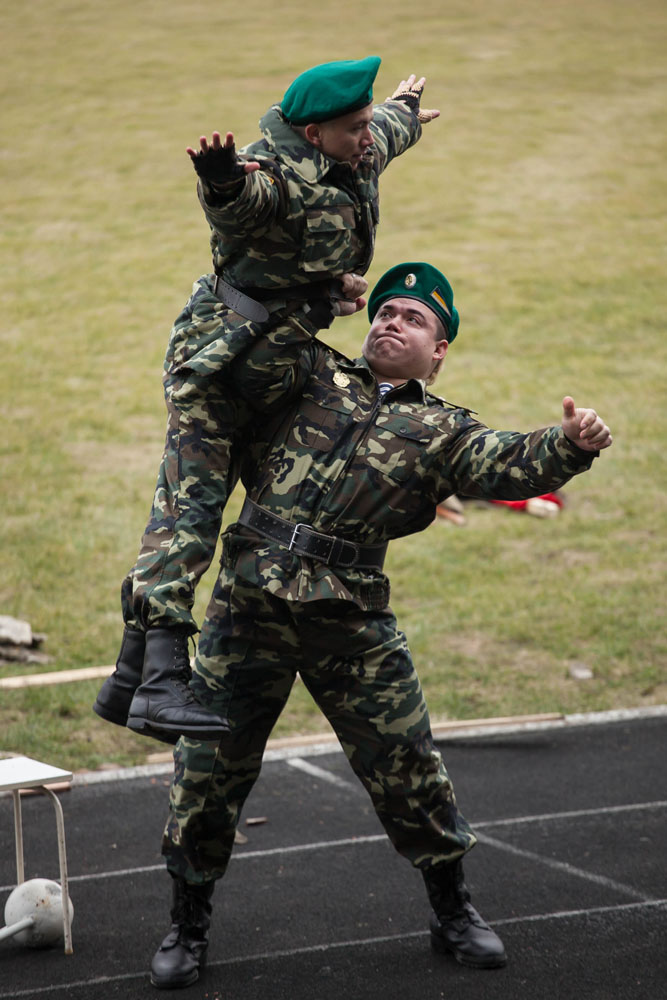 Николай Иов демонстрирует свою силу на прошедшем 22 февраля 2013 года традиционном военно-спортивном празднике в Тирасполе.